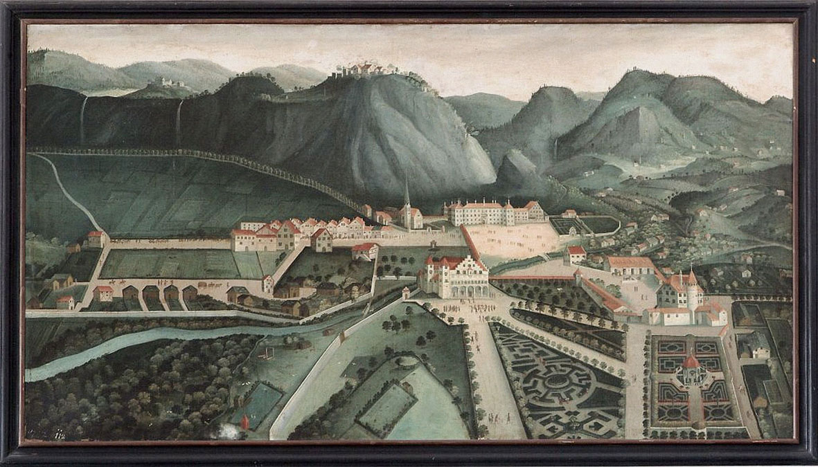 Hohenems am Anfang des 17. Jahrhunderts: Vor dem RenaissancePalast lagen prachtvolle Gartenanlagen mit Tiergarten, Fischweiher und Lusthaus.